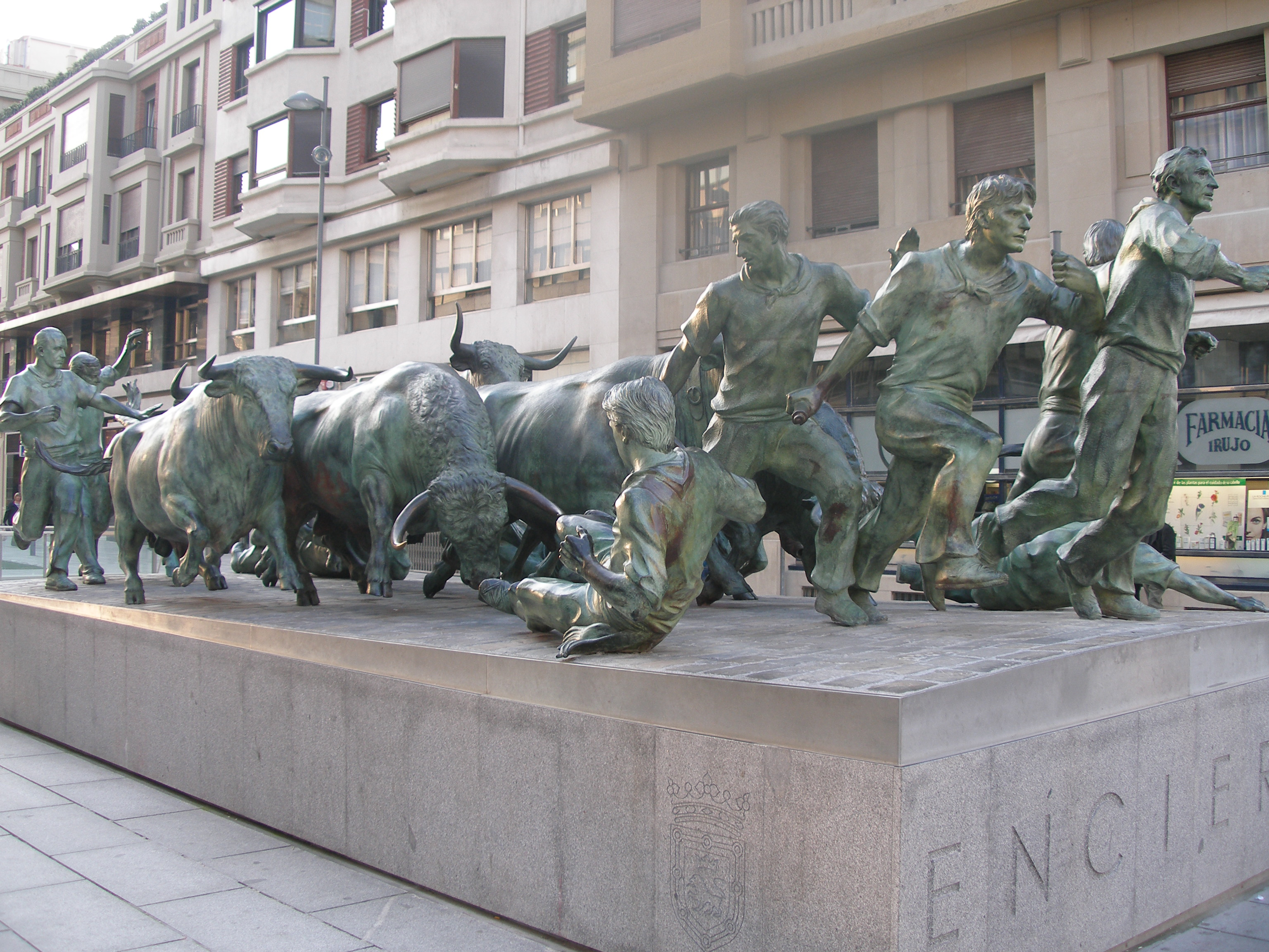 Monumento al Encierro de Pamplona (Navarra, España).